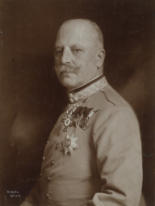 Friedrich von Georgi (1852–1926)